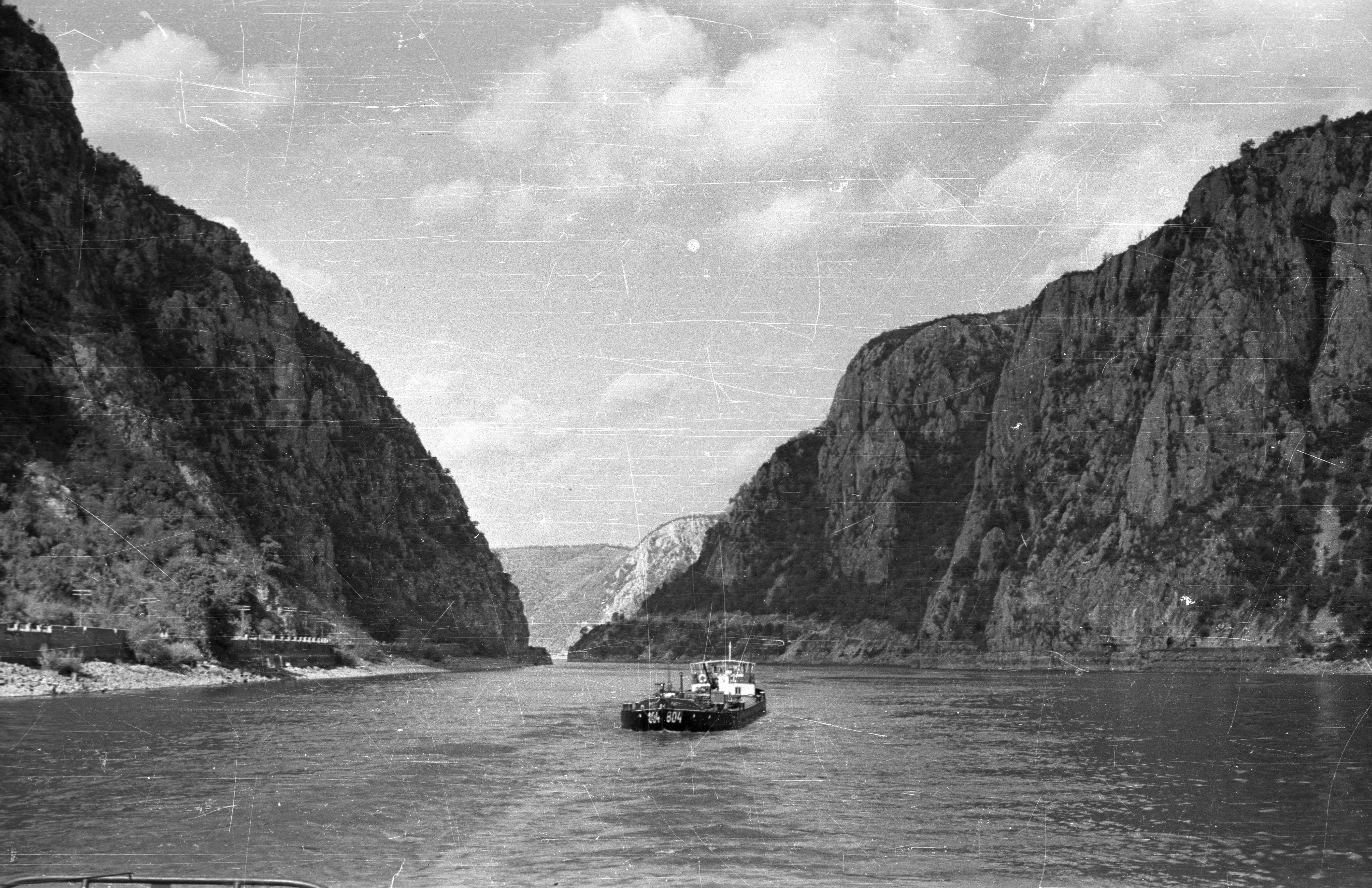 Nagy-Kazán-szoros Dubova közelében. Location: Romania, Serbia Title: Nagy-Kazán-szoros Dubova közelében.